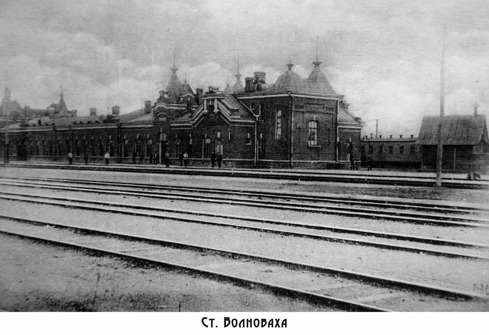 Иллюстрация из книги «К 25-летию Екатерининской железной дороги»